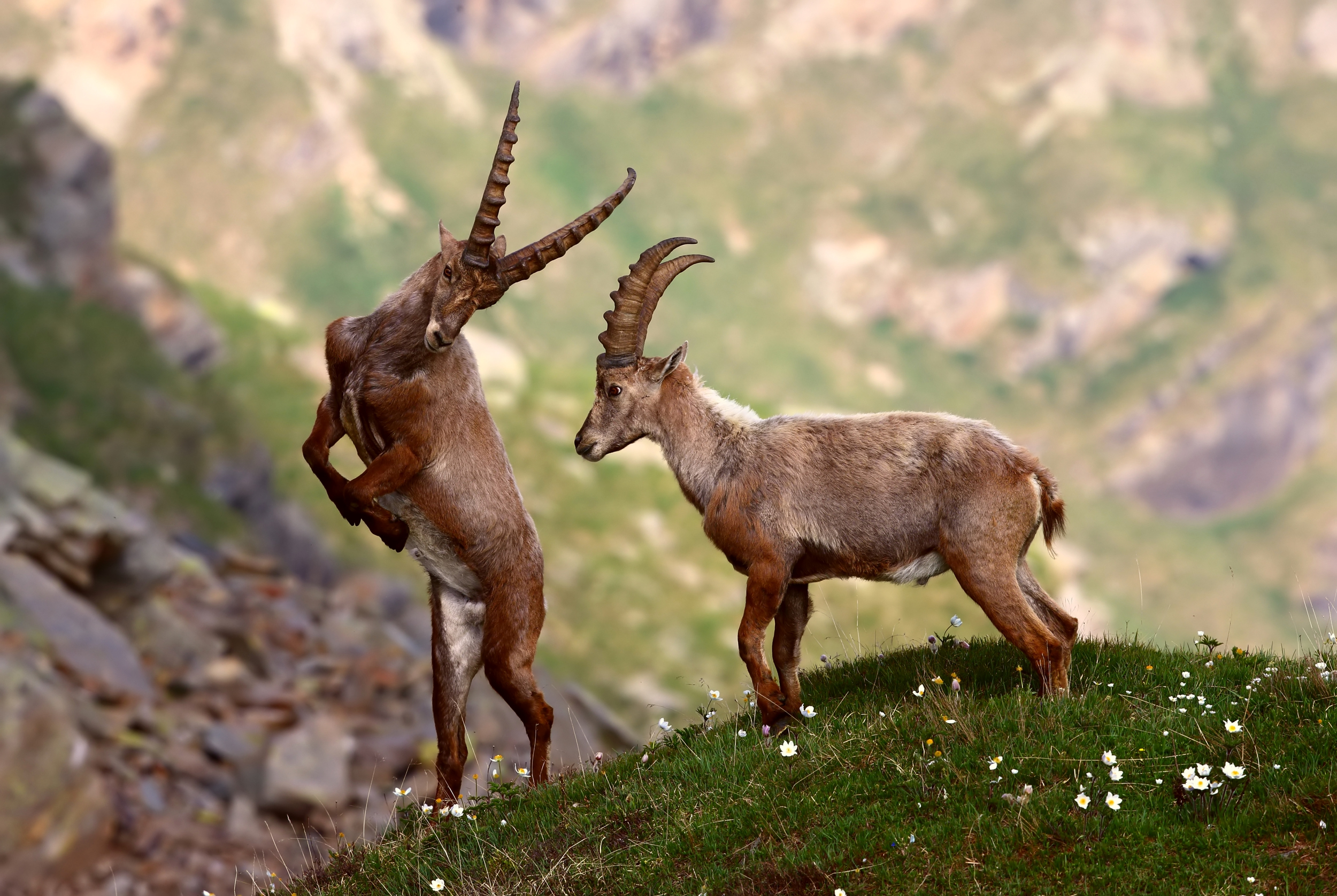 Parco nazionale del Gran Paradiso (Q847690)